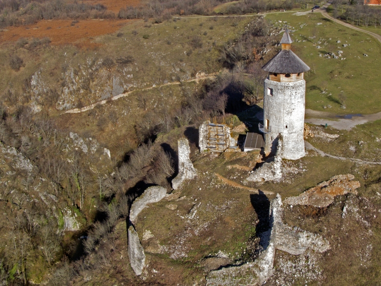 Zračna snimka starog grada Drežnika.